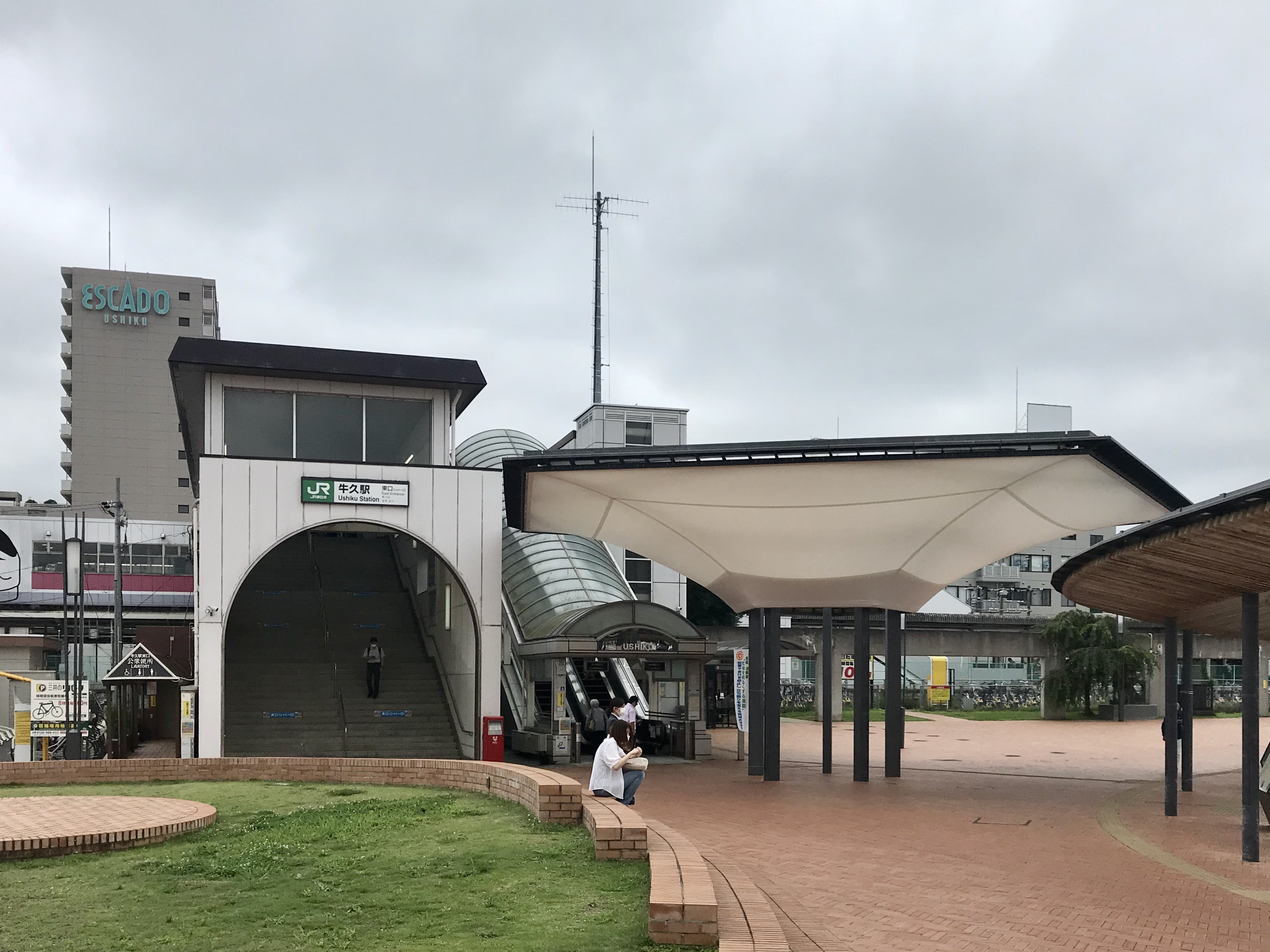 牛久駅東口